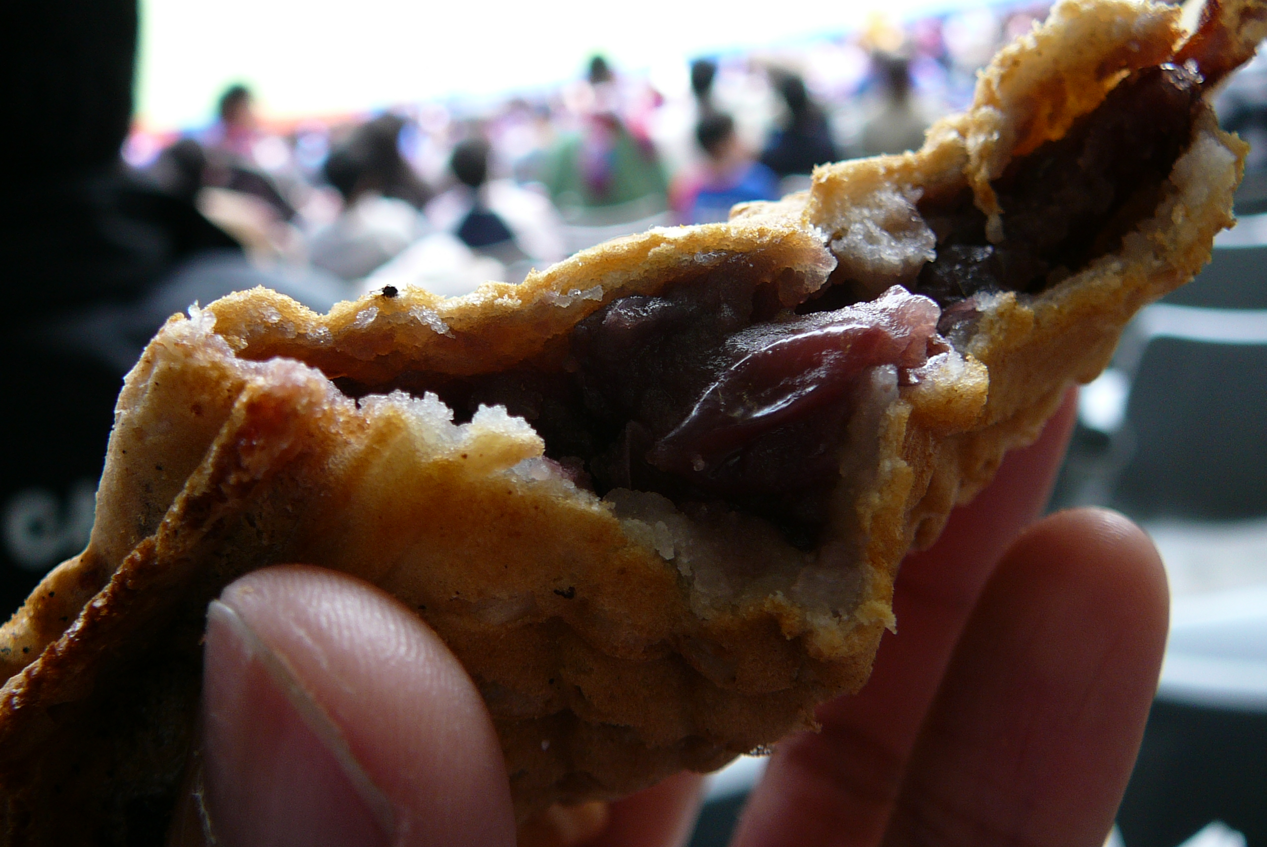 たい焼きの断面.